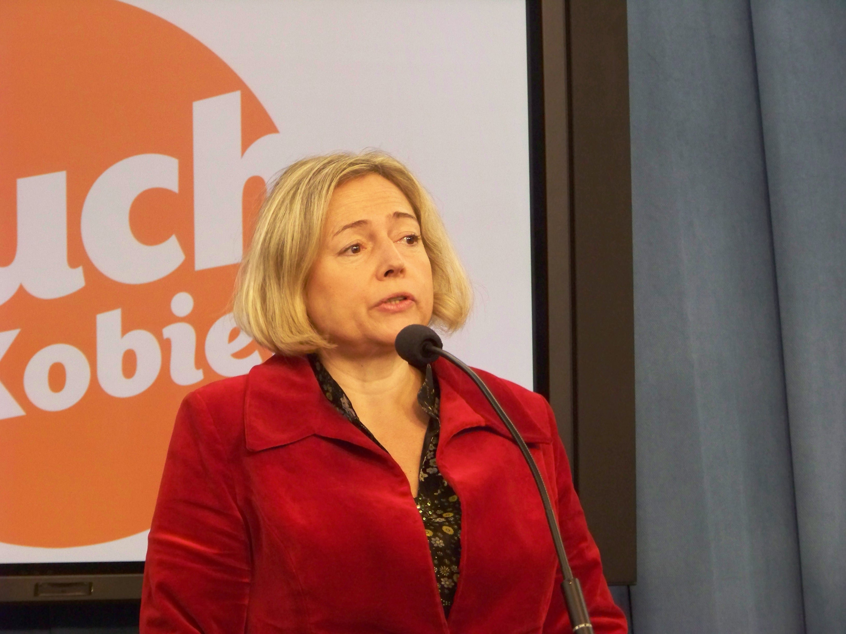 Sejm, konferencja prasowa.